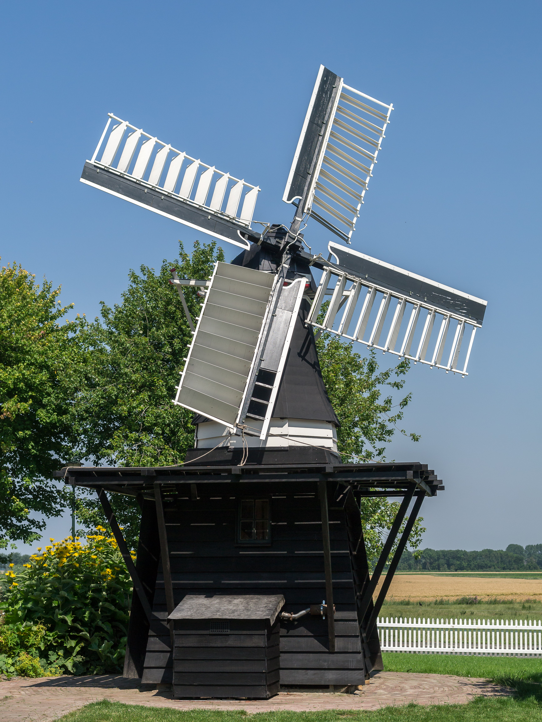 Houtzaagmolen "De David" in het Hoogeland openluchtmuseum te Warffum